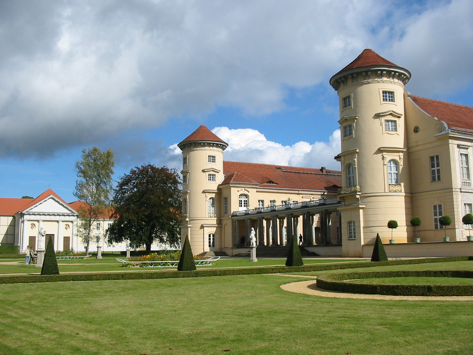 Schloss Rheinsberg, Landkreis Ostprignitz-Ruppin, Brandenburg.